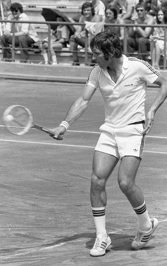 Dumitru Haradau intr-un meci de tenis din Cupa Davis.